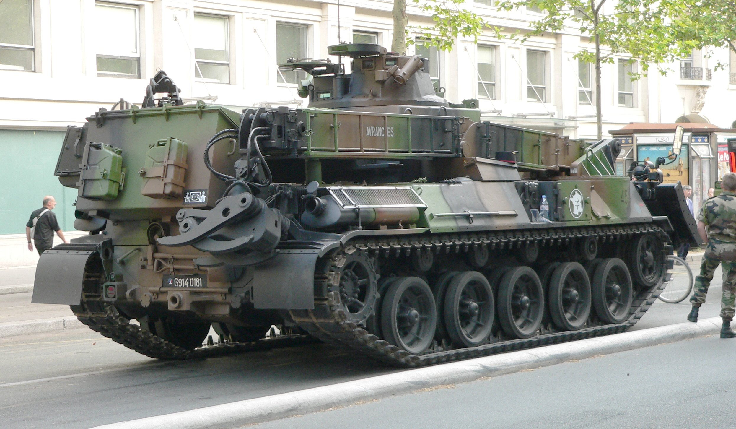 Engin Blindé du Génie. Photograph taken at: Military parade, Avenue des Champs-Élysées, 14 July 2006